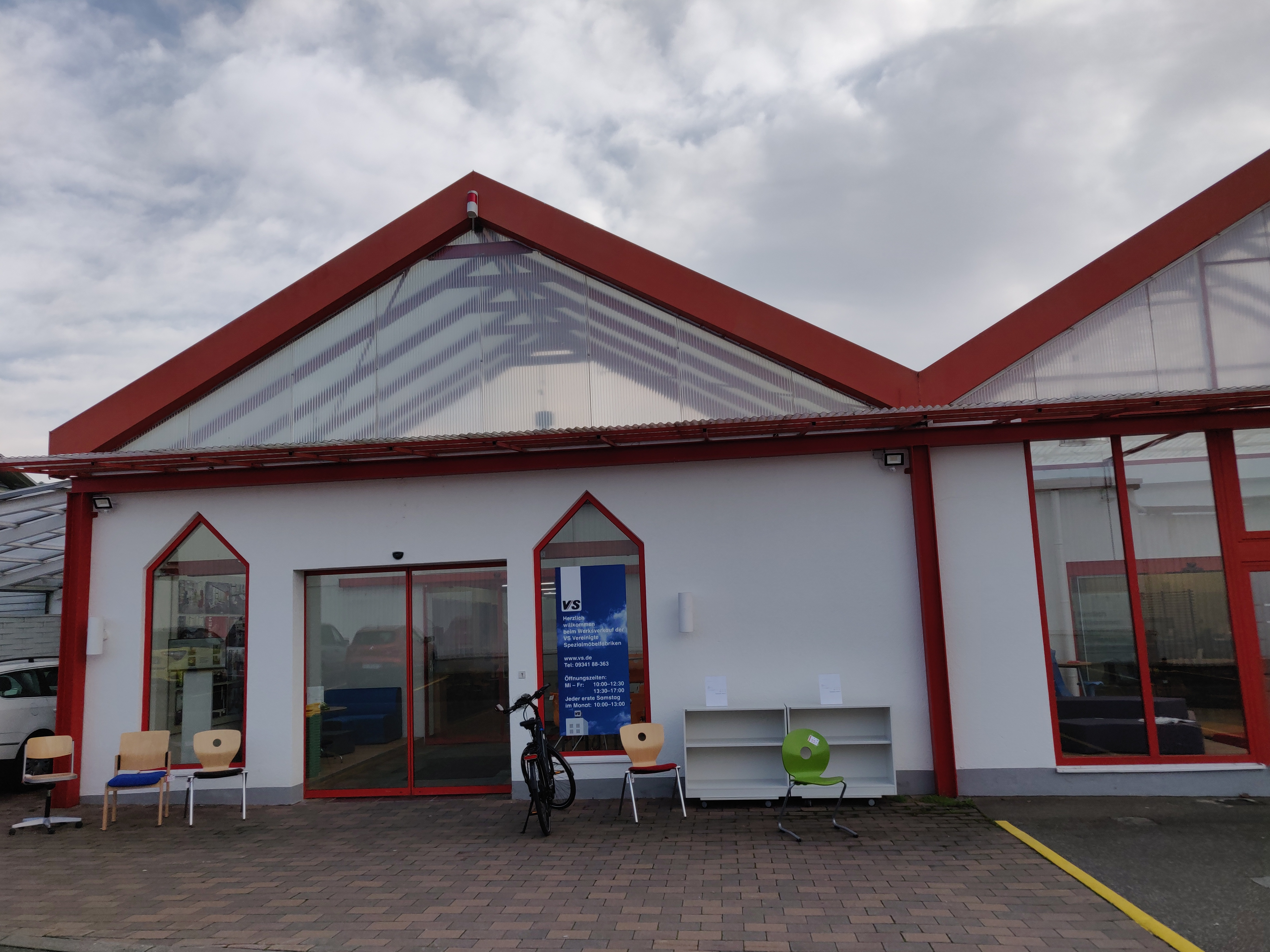 Möbelhaus